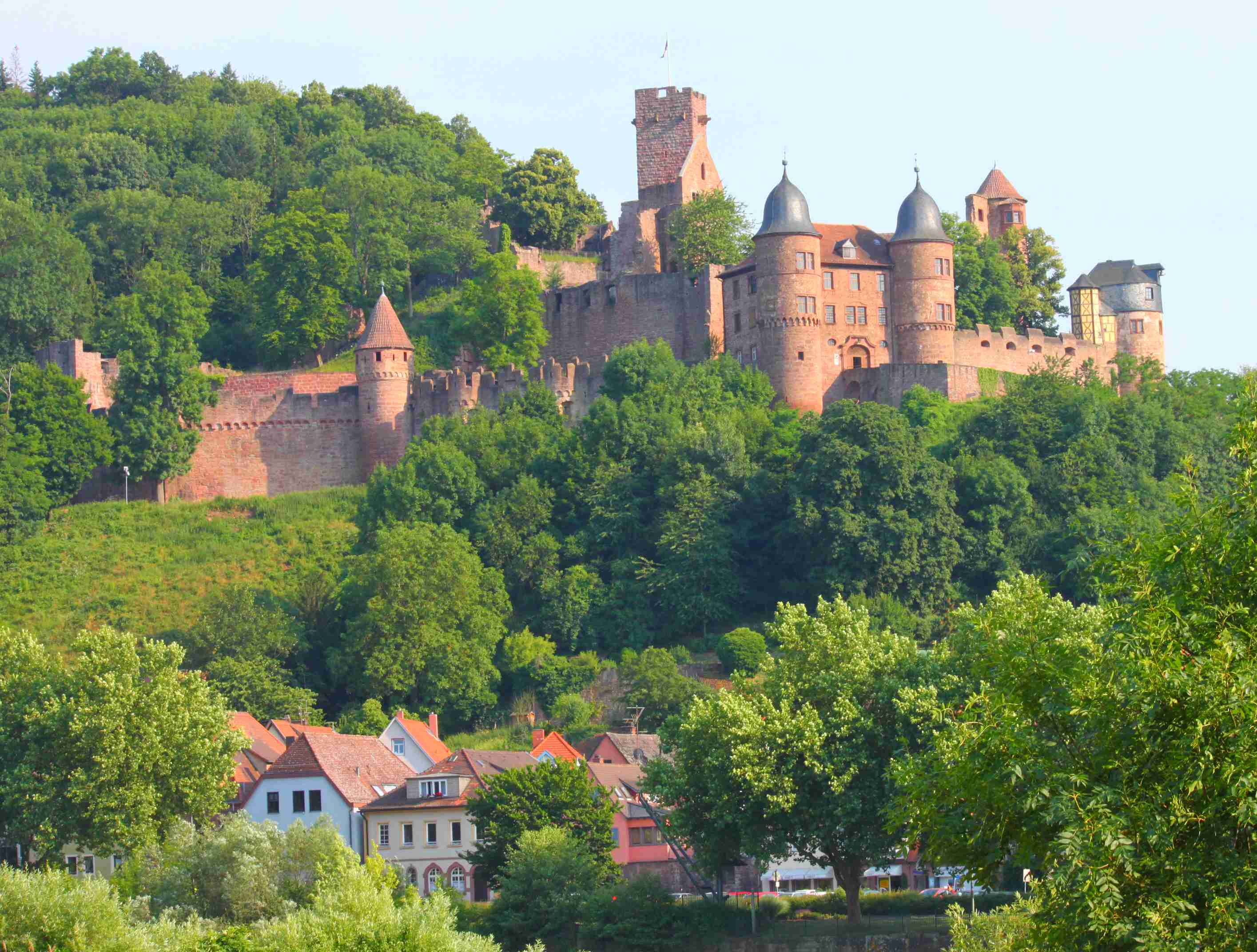 Die Burg von Wertheim von Kreuzwertheim, auf der anderen Mainseite, aus gesehen